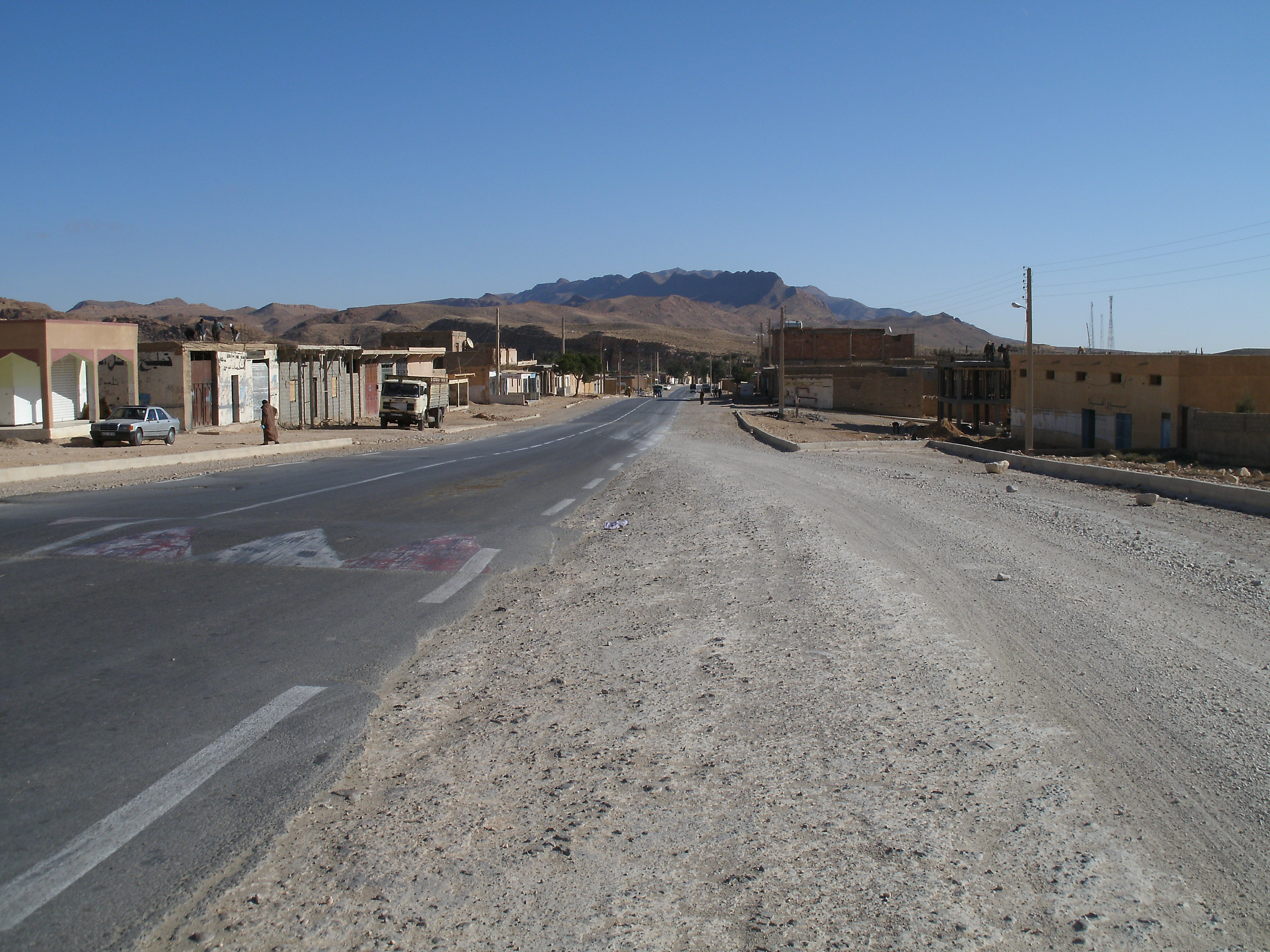 Ech Chaïba